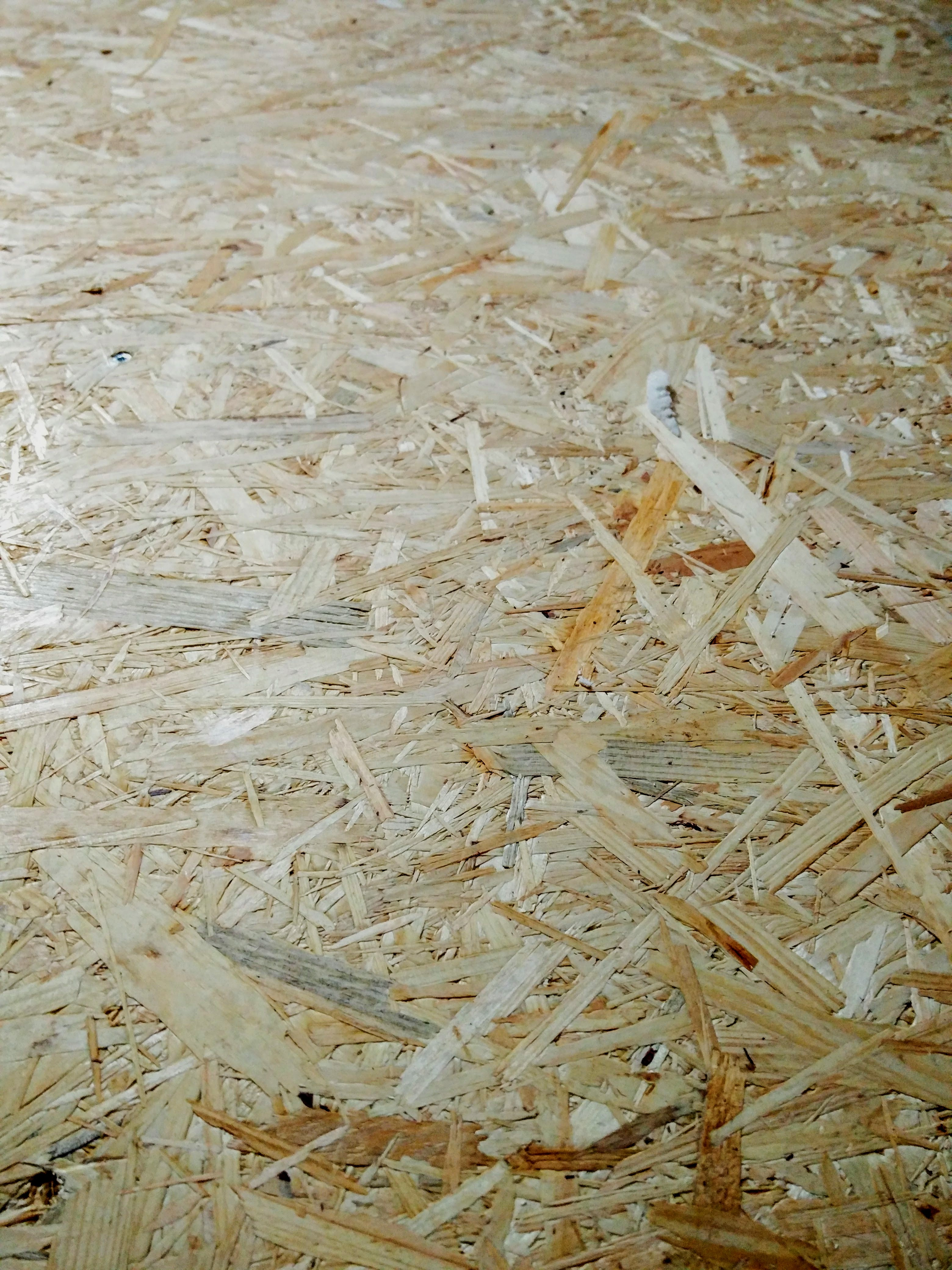 OSB plaat on tihe puitmaterjal.